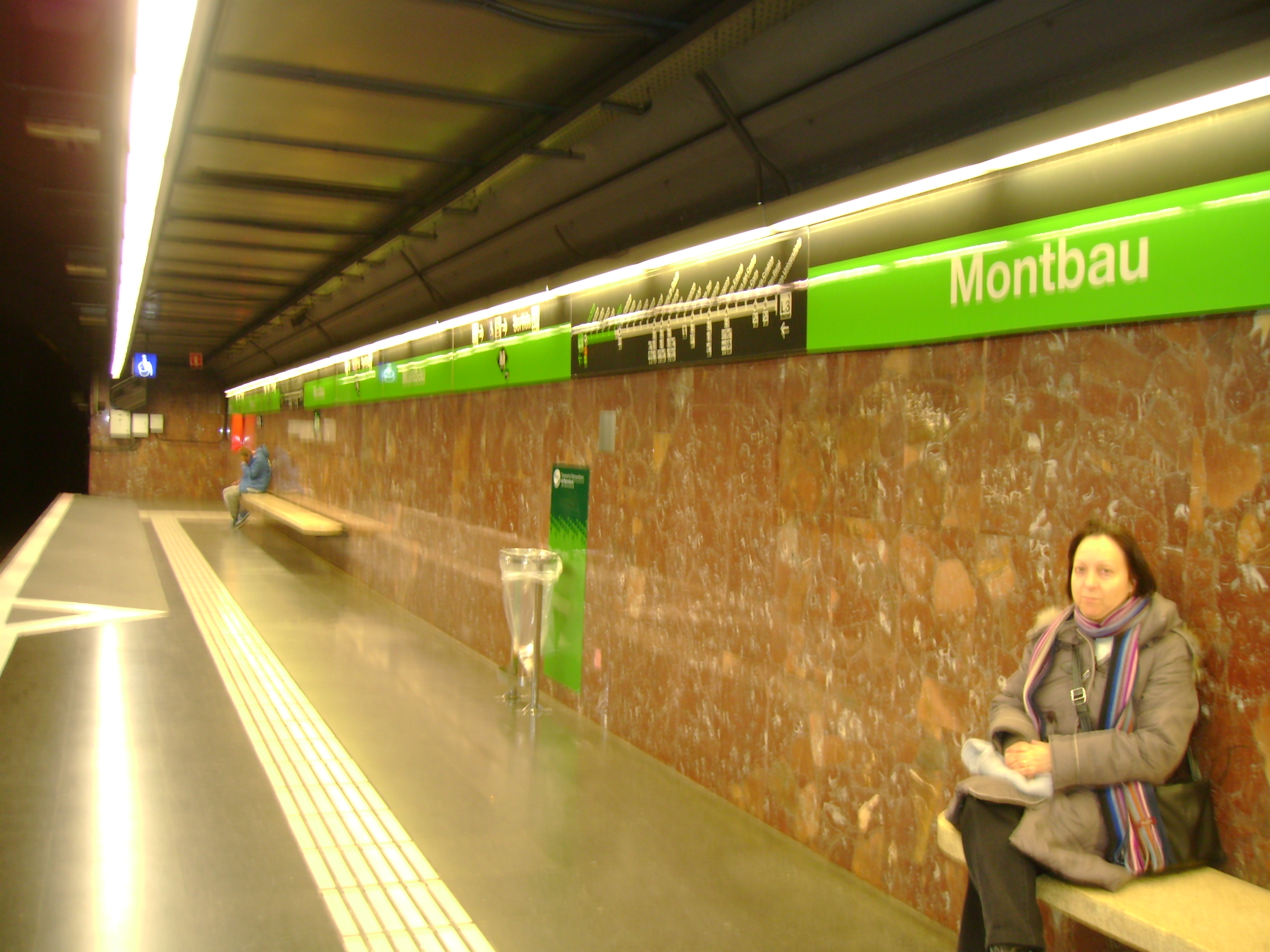 Foto capturada per la meva càmara a l'estació de Montbau (Metro de Barcelona).